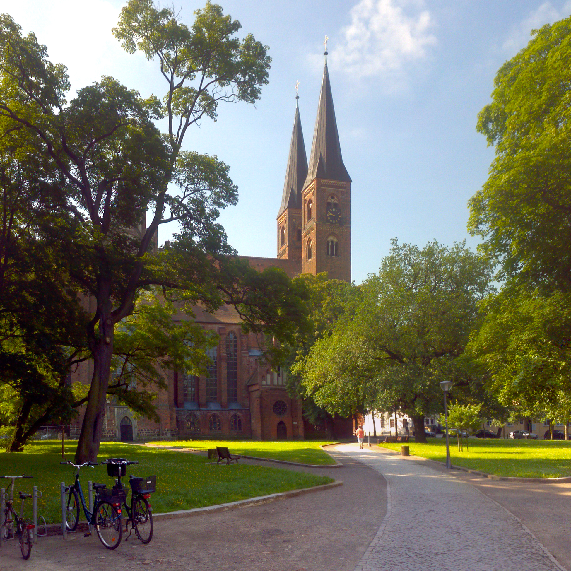 Dom zu Stendal, Panorama